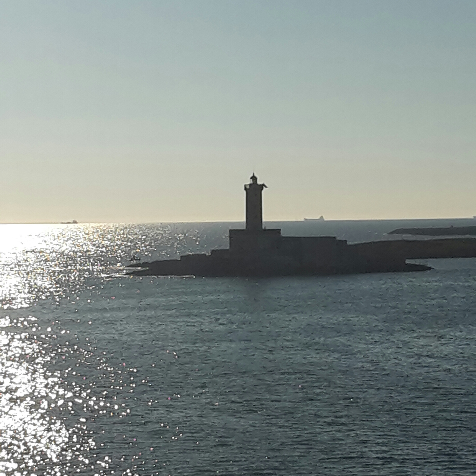 Il vecchio faro sull'isola Traversa nell'arcipelago delle Pedagne. È stato costruito nel 1859 e attualmente svolge la funzione di fanale rosso automatizzato.